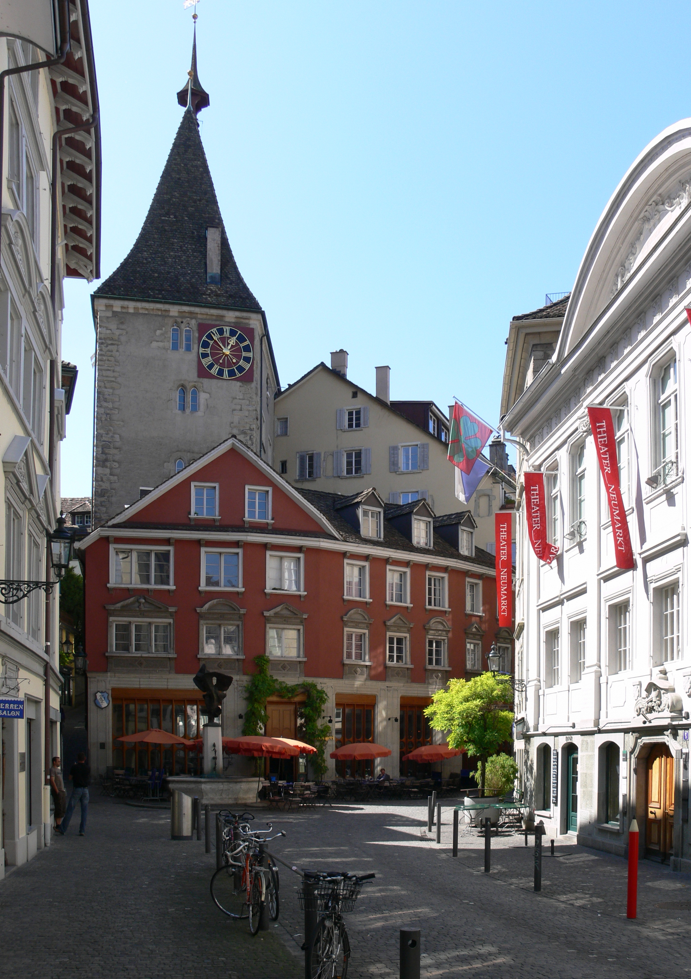 Zürich, Neumarkt, im Hintergrund der Grimmenturm, rechts das Theater am Neumarkt; im roten Gebäude der Studentengesangverein Zürich